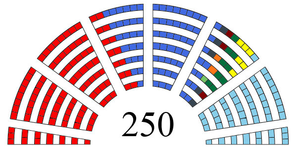 Parlamentarni izbori 1992 - raspodela mandata